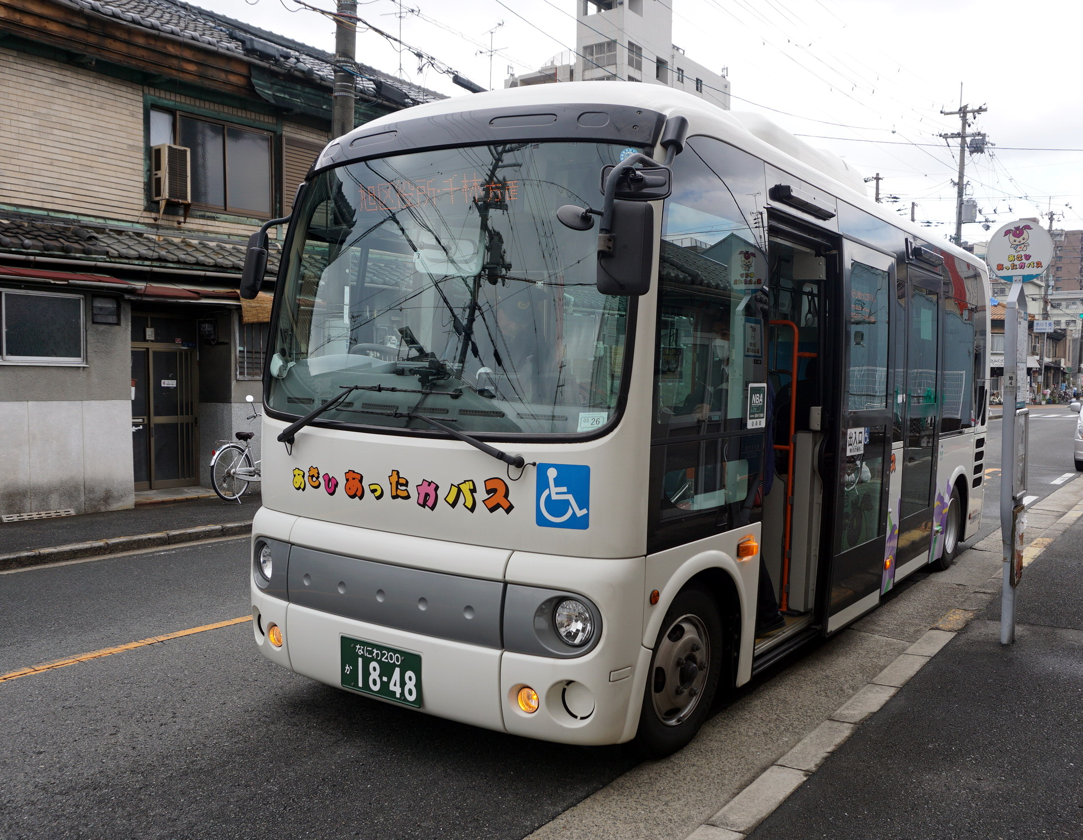 あさひあったかバス。「赤川一丁目東」バス停（大阪市旭区赤川1丁目6）にて。 Sony ILCE-6000